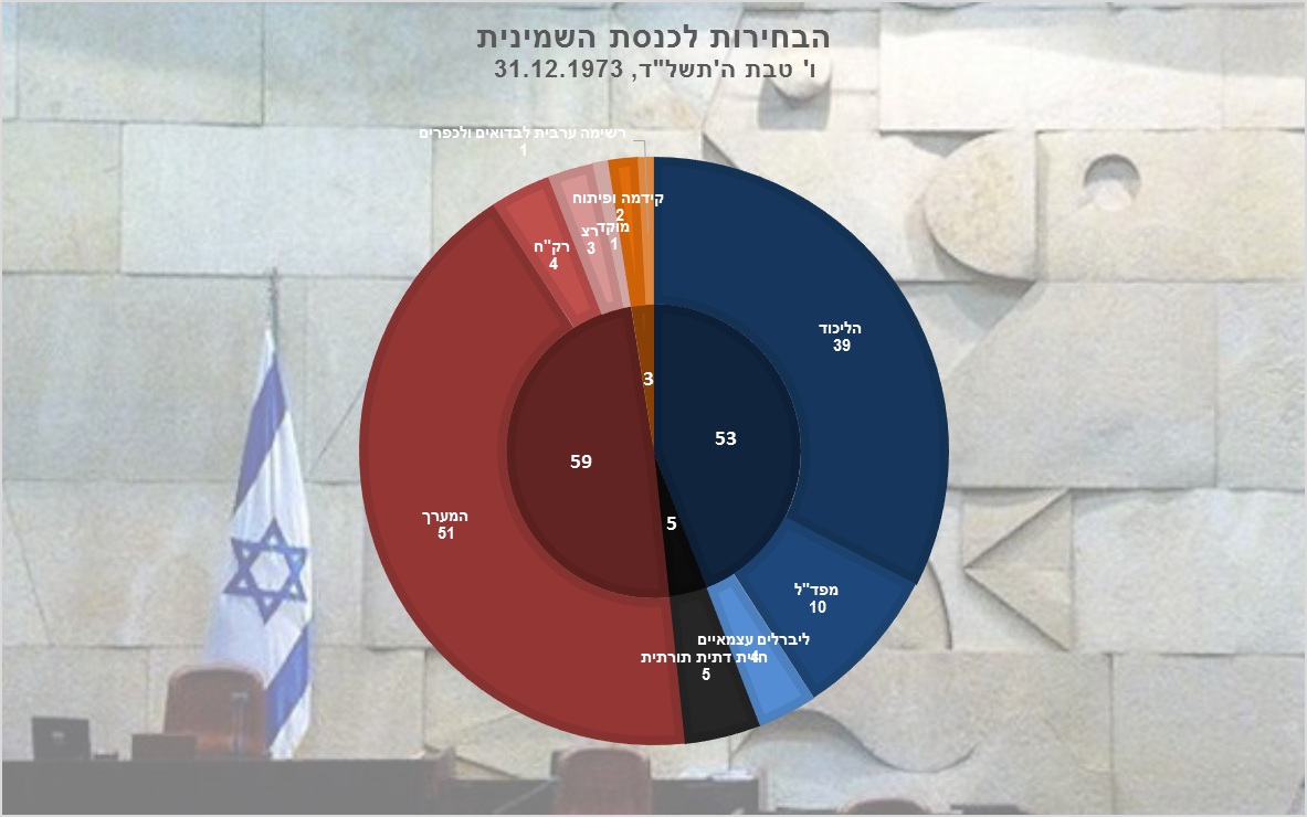 תוצאות הבחירות לכנסת השמינית